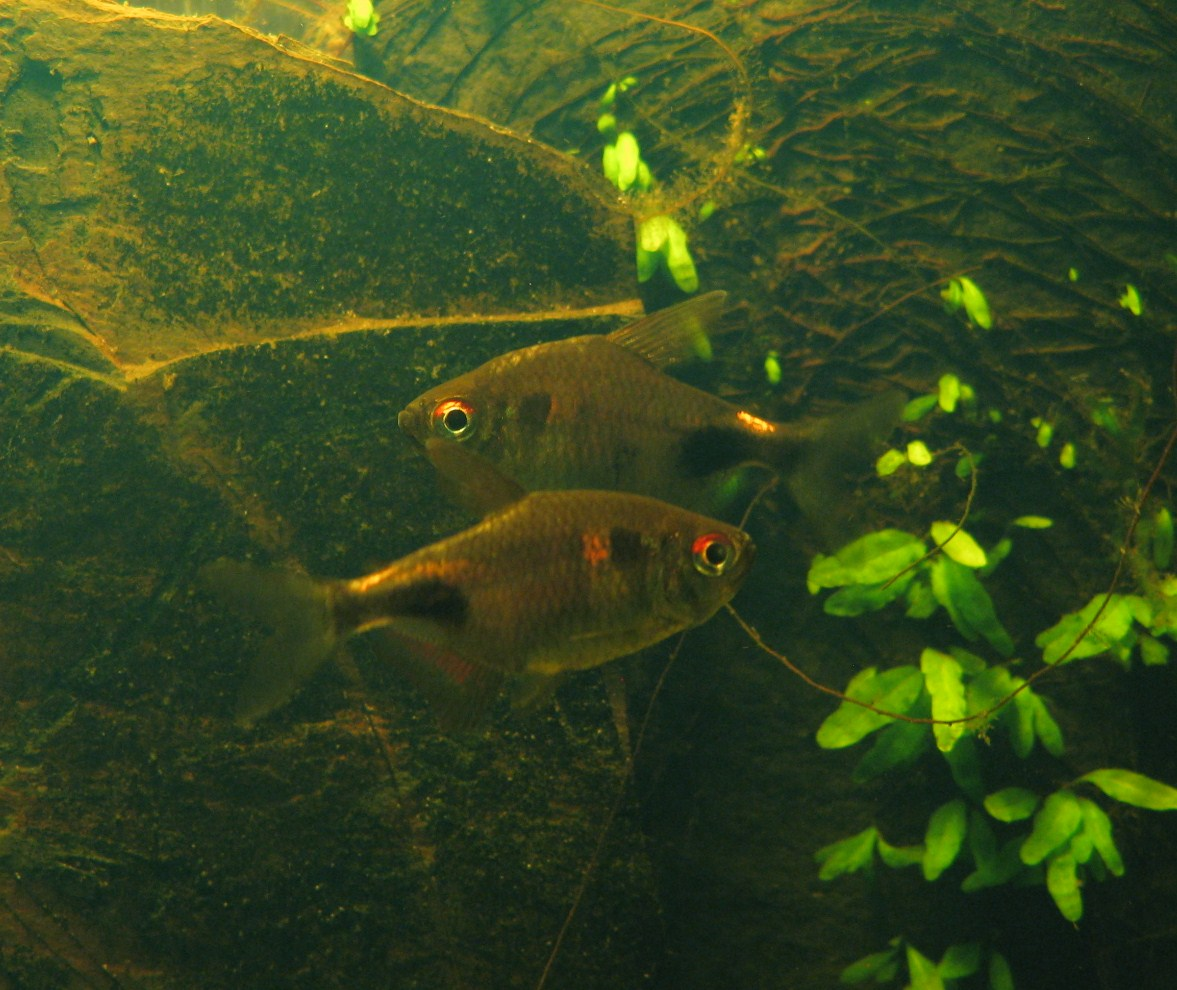 Hemigrammus pulcher